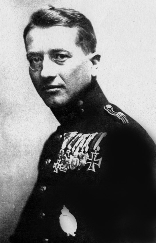 Portret Godwina von Brumovskega, avstroogrskega letečega asa.